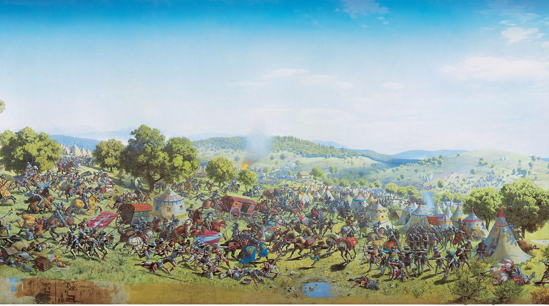 Louis Braun - panorama de la bataille de Morat.